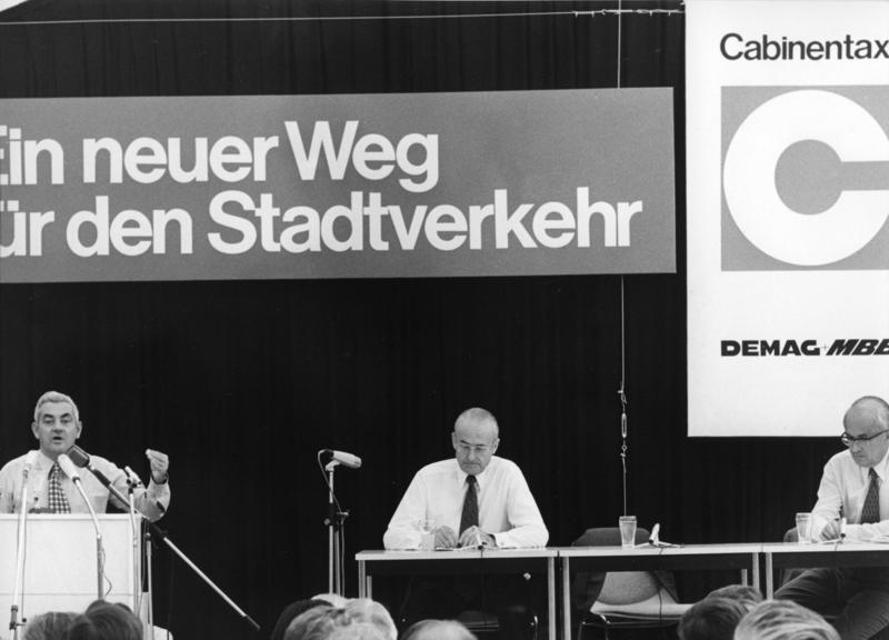 Bundesminister Dr. Horst Ehmke eröffnet die erste Erprobungsanlage für Cabinentaxi "CAT" in Hagen